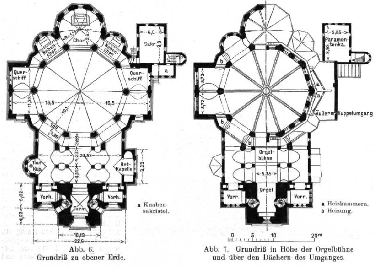 Maria, Hilfe der Christen in Berlin-Spandau Abbildung aus dem Zentralblatt der Bauverwaltung - Grundriss